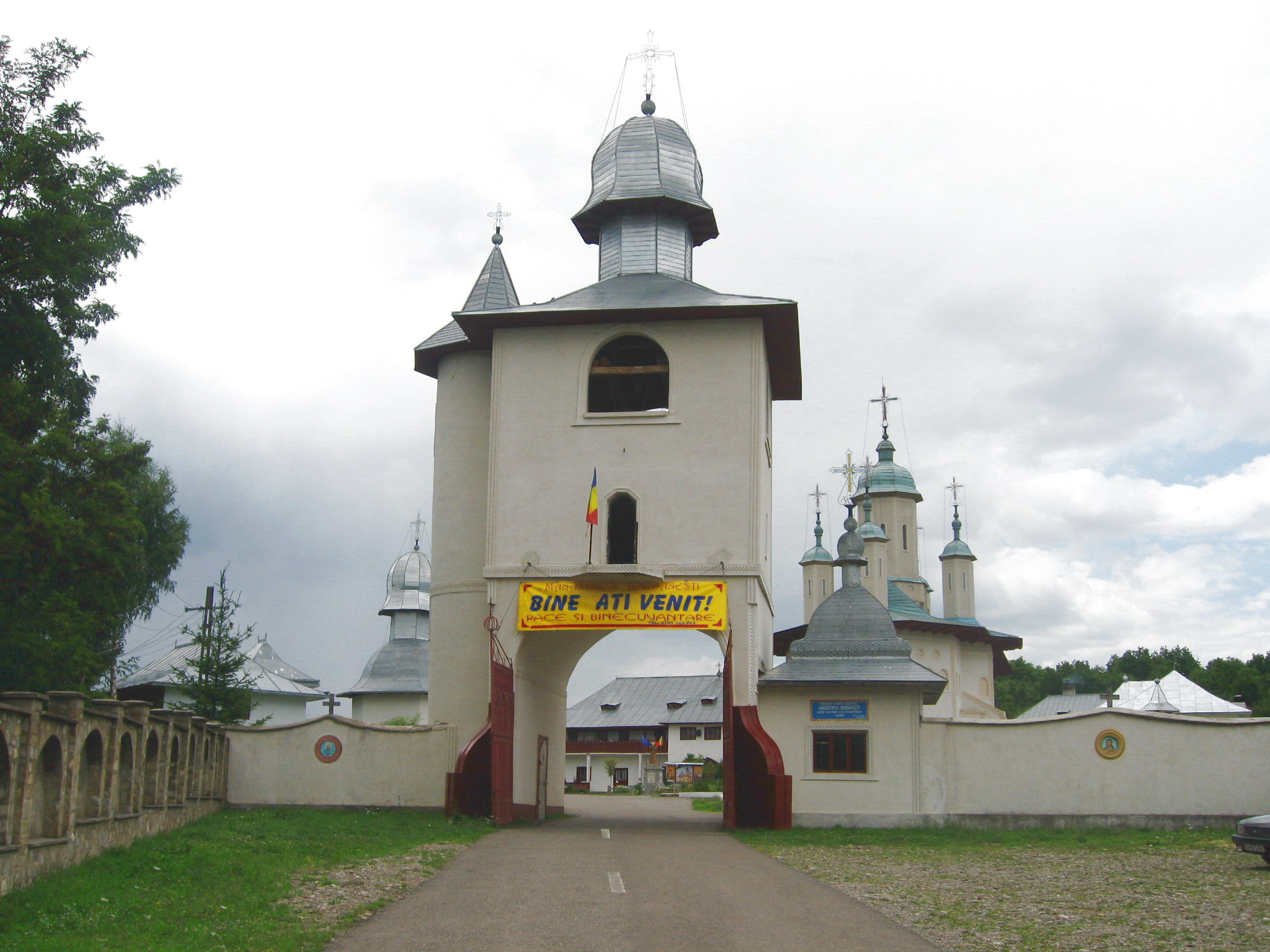 Klášter Bogdanesti v Rumunsku